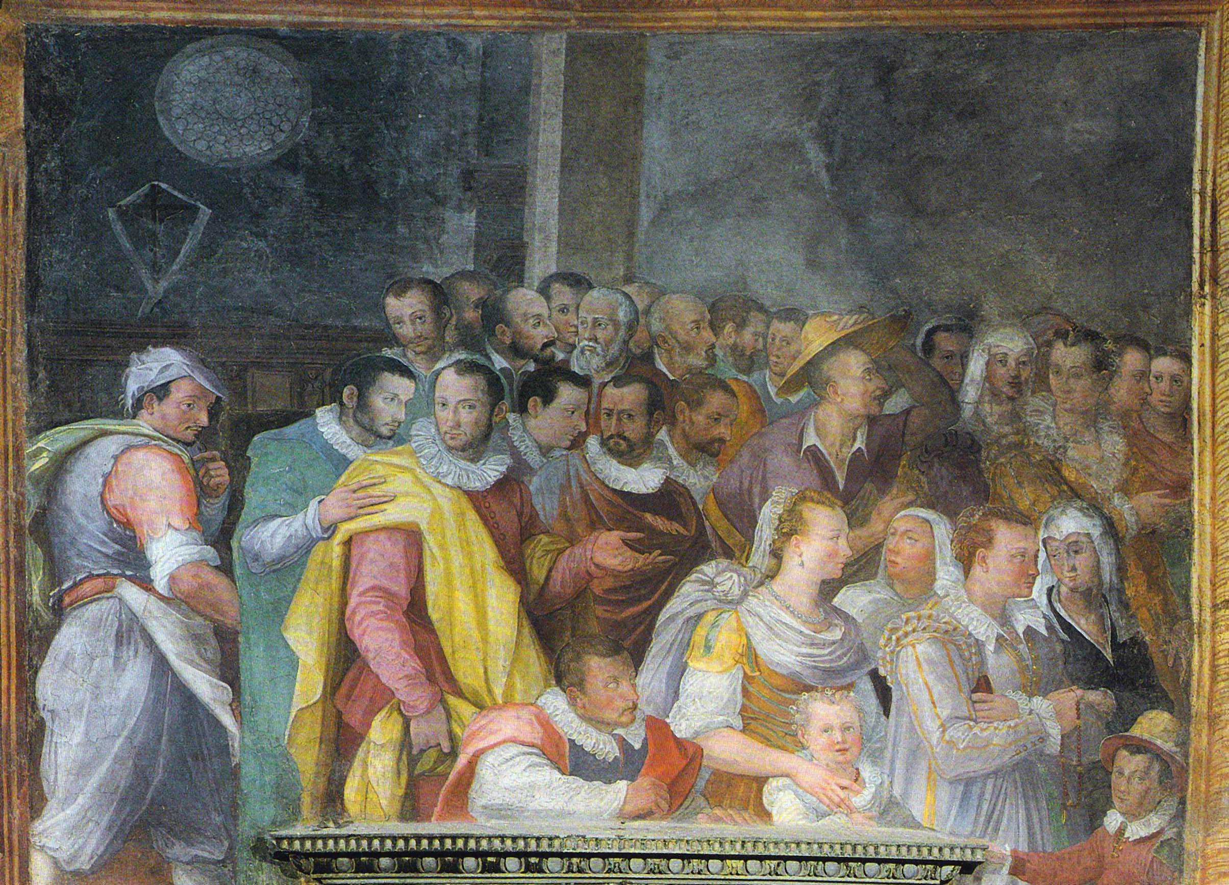 Alessandro Allori - Gentiluomini e Popolani durante la ricognizione delle spoglie di San Giovanni Gualberto (Abbazia di Passignano)